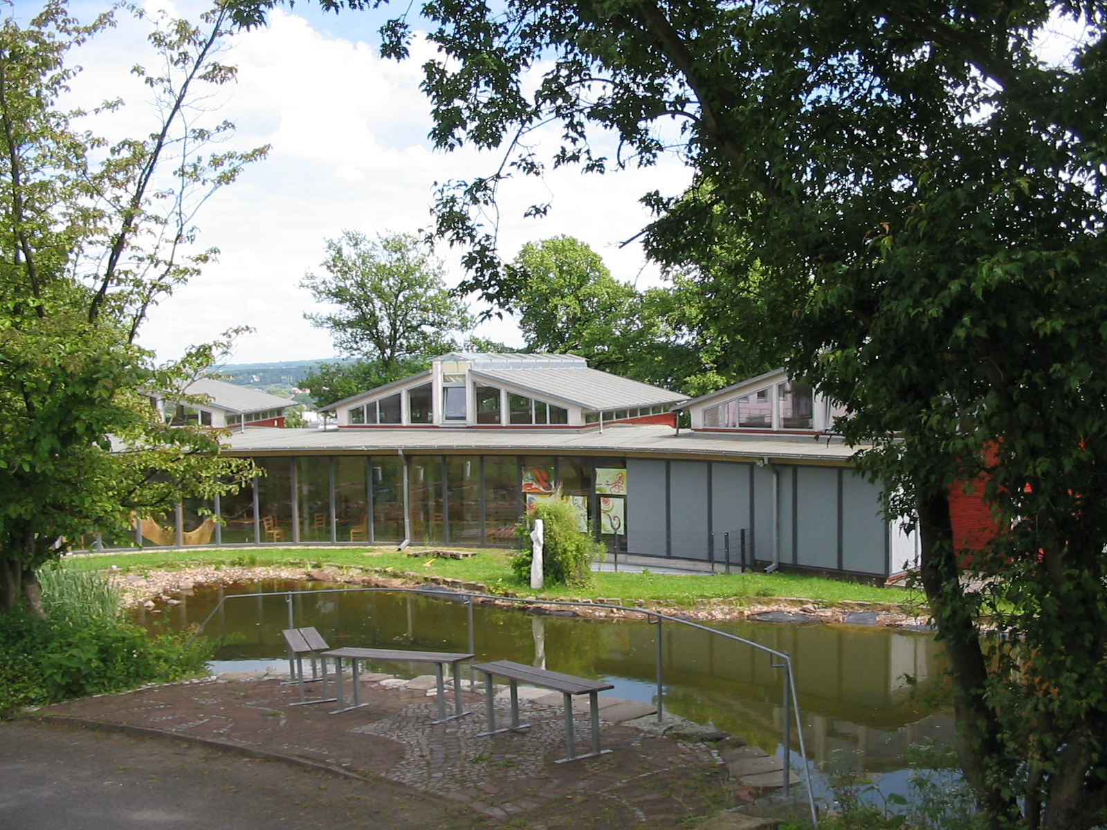 Institut für Waldorf-Pädagogik, Witten-Annen: Teichbau